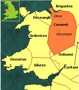 Mapa del territorio de los Cornovii